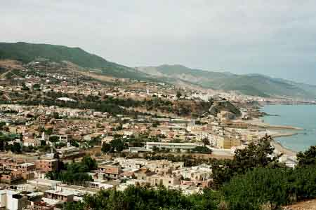 Tenes, Algeria